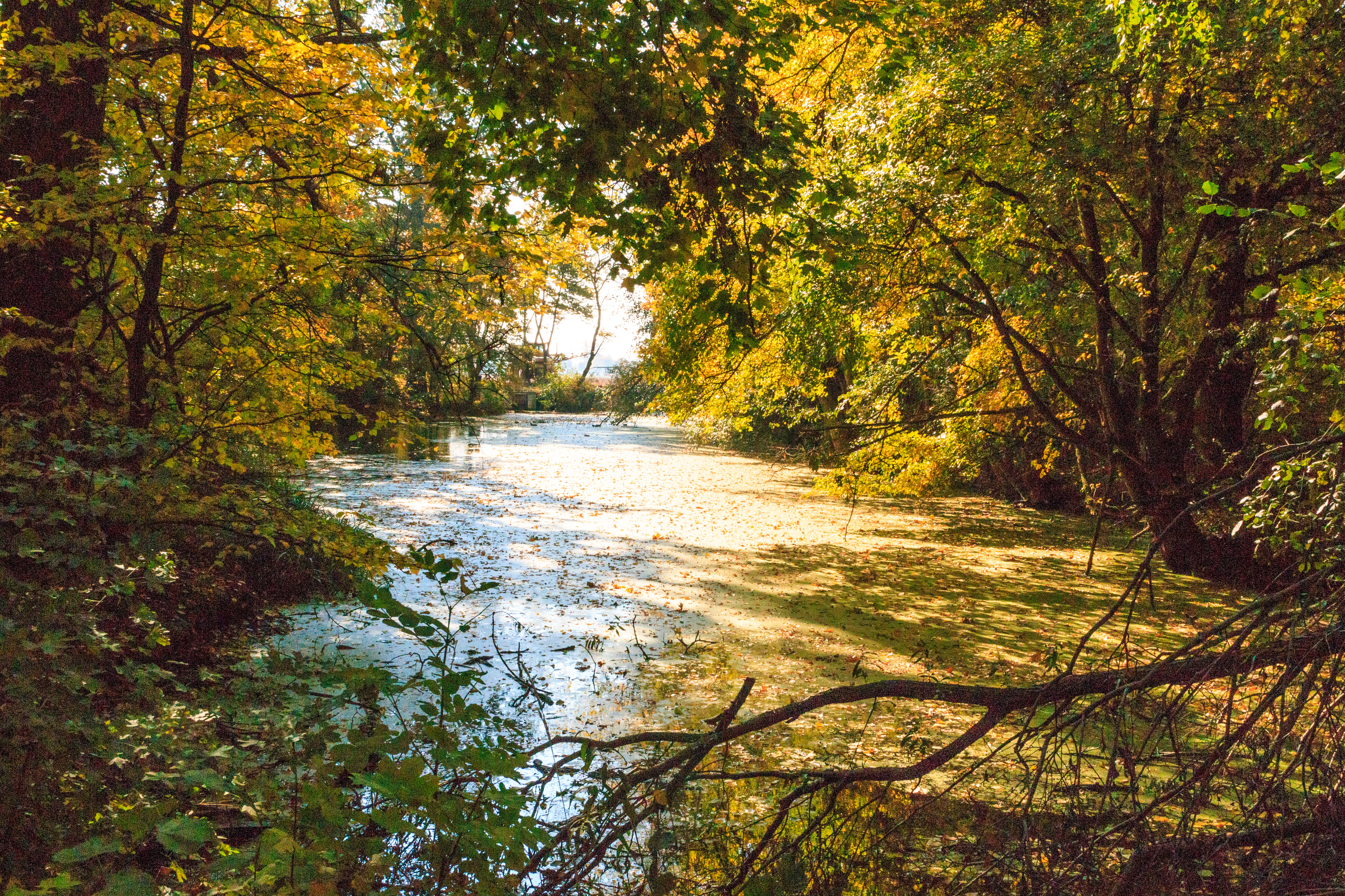 Ornstova jezera u Věkoše Project: Vodstvo.